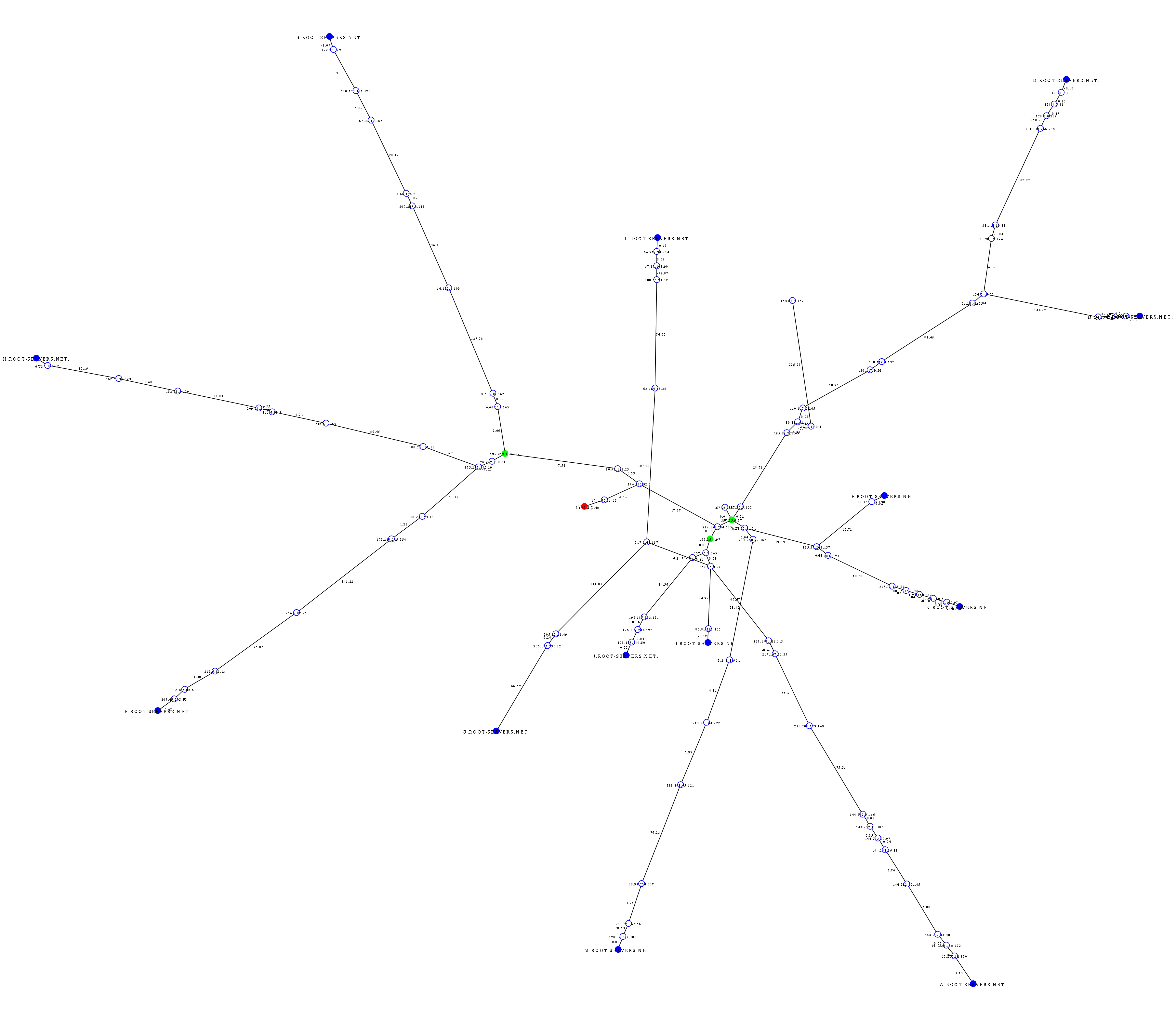 Полученная с помощью tracemap графическая карта трассировки пути на корневые сервера DNS с хоста, расположенного в Киеве